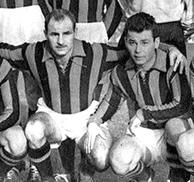 Rubén Bravo en OGC Nice con Just Fontaine, año 1956